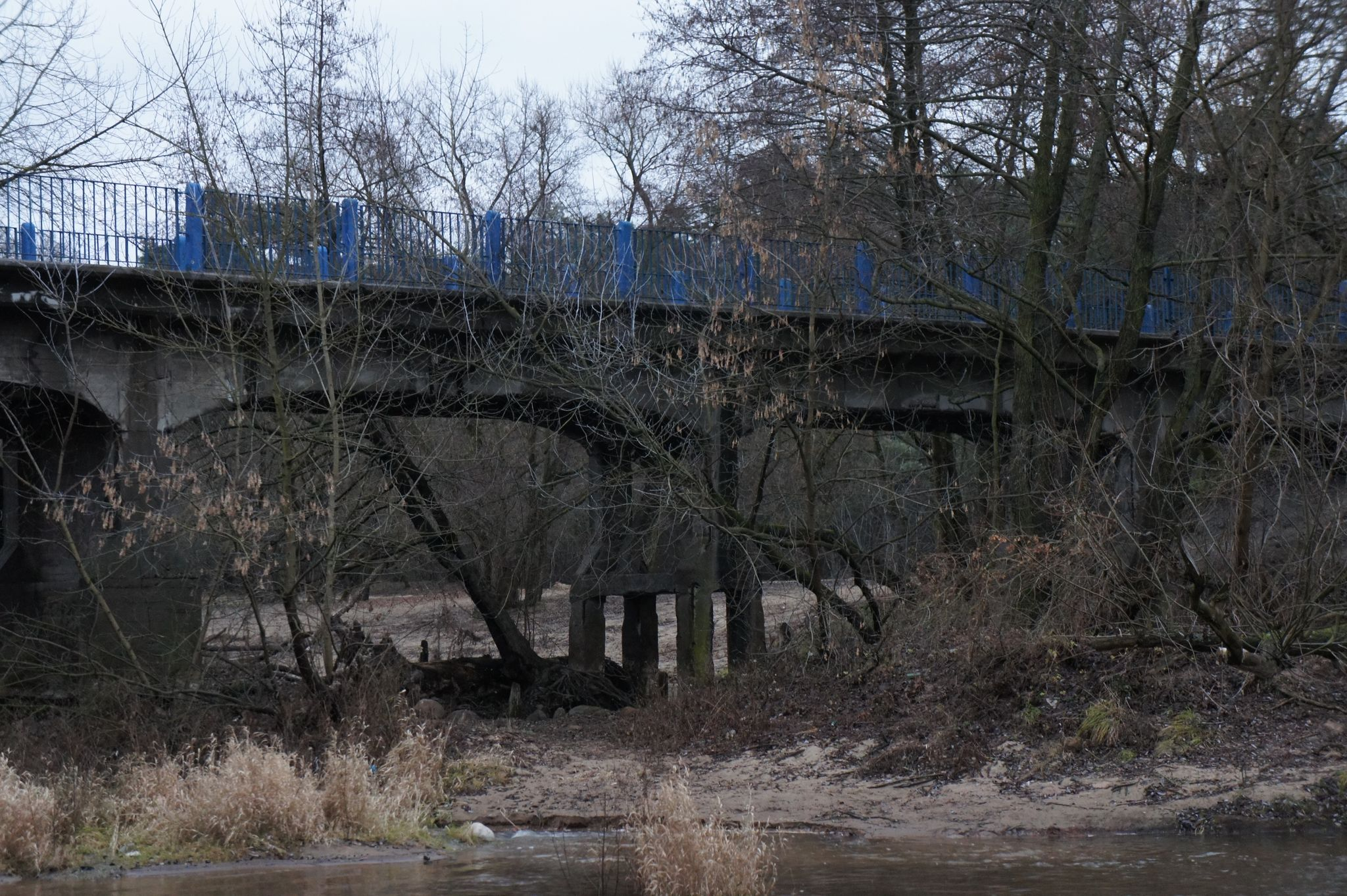 Dawny most kolejowy nad rzeką Świder - pozostałość po Kolei Jabłonowskiej.